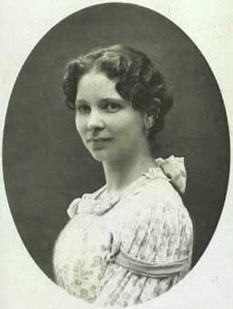 Brita Barnekow (1868-1936), Danish painter